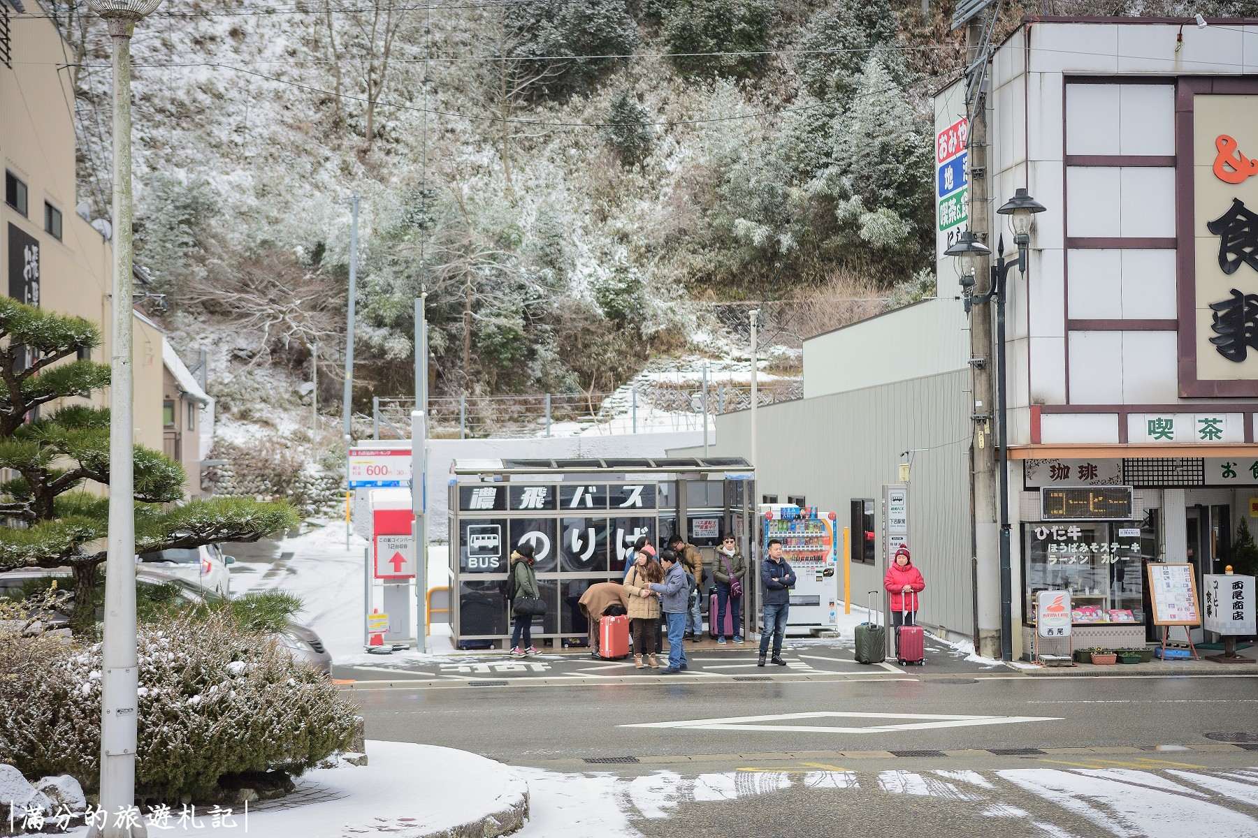 【日本。下呂散策】